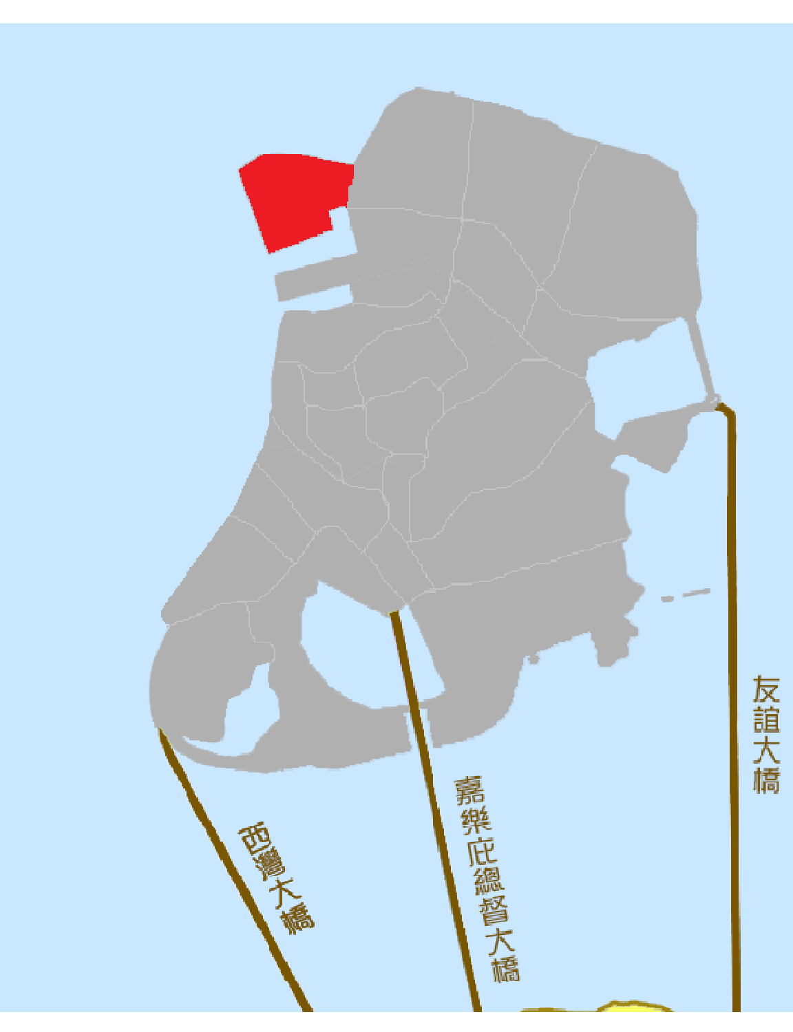 在澳門地圖的青洲